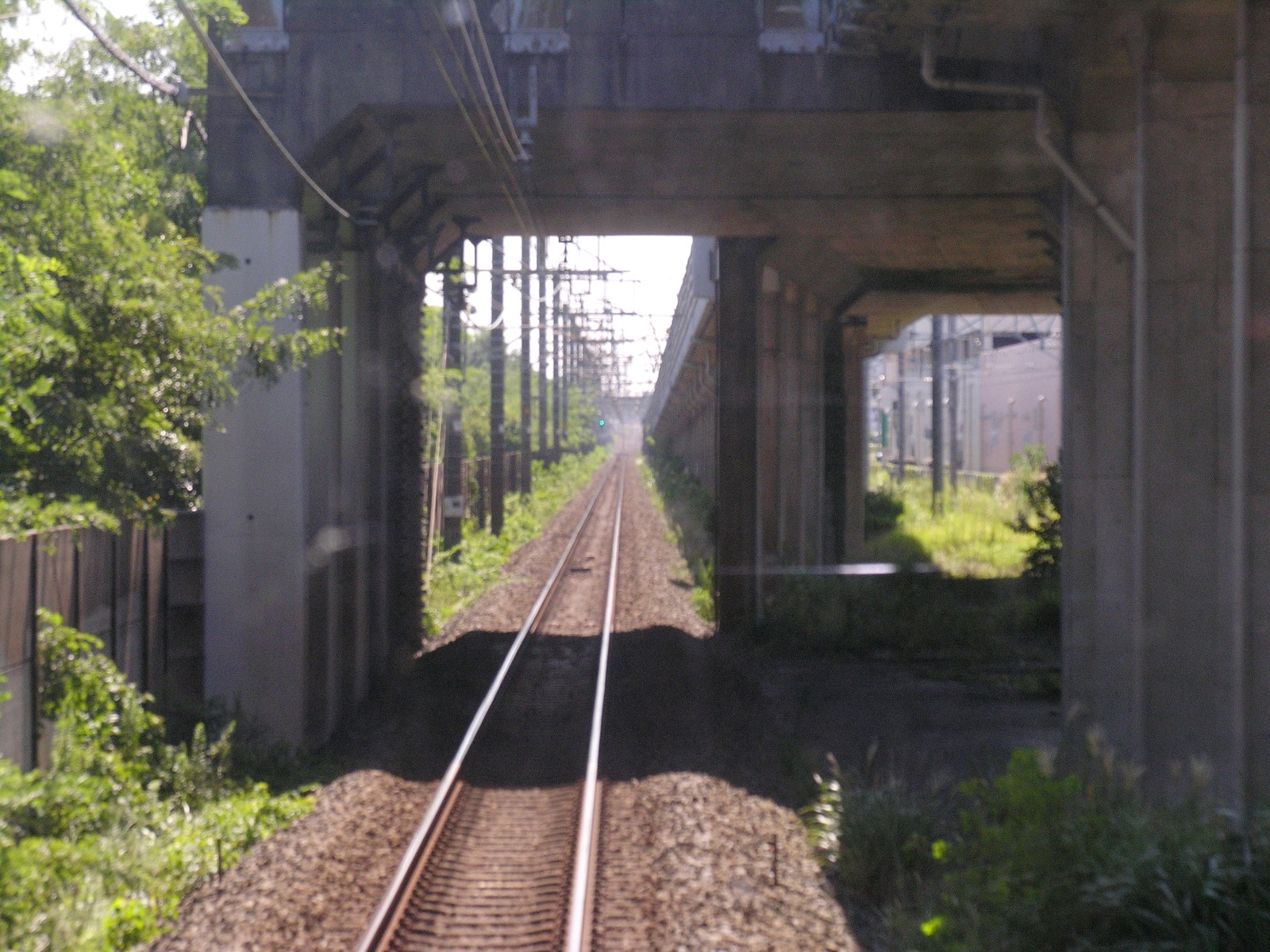 京葉線の千葉みなと～稲毛海岸間にある新港信号場です。